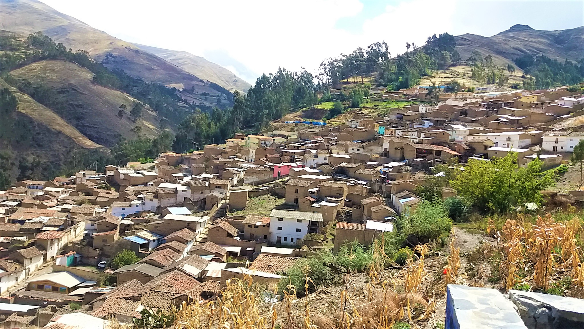 Vista del pueblo desde el mirador en la capital del distrito de Aija, provincia de Aija y departamento de Áncash.